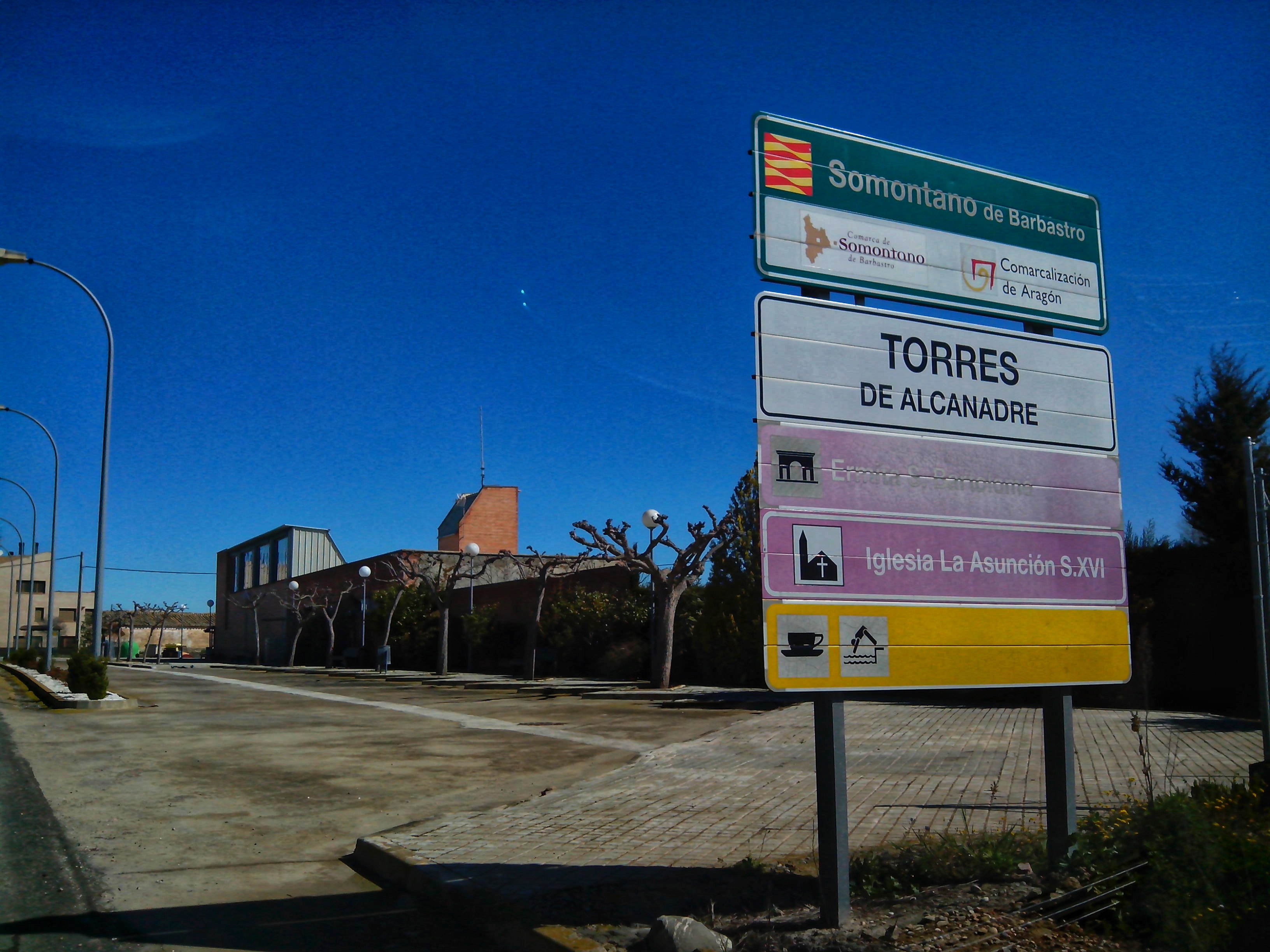 Torres de Alcanadre